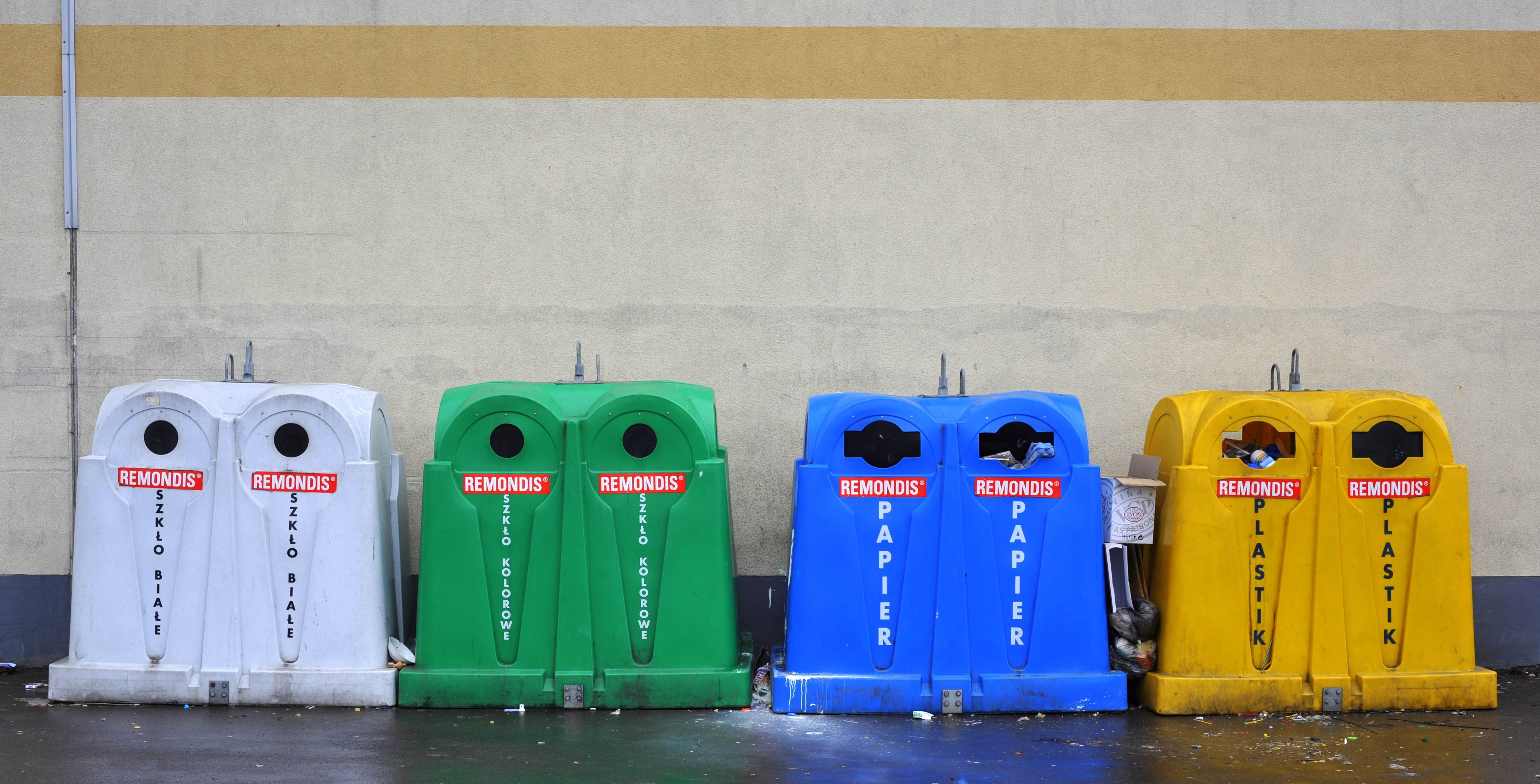 Pojemniki do selektywnej zbiórki odpadów firmy Remondis